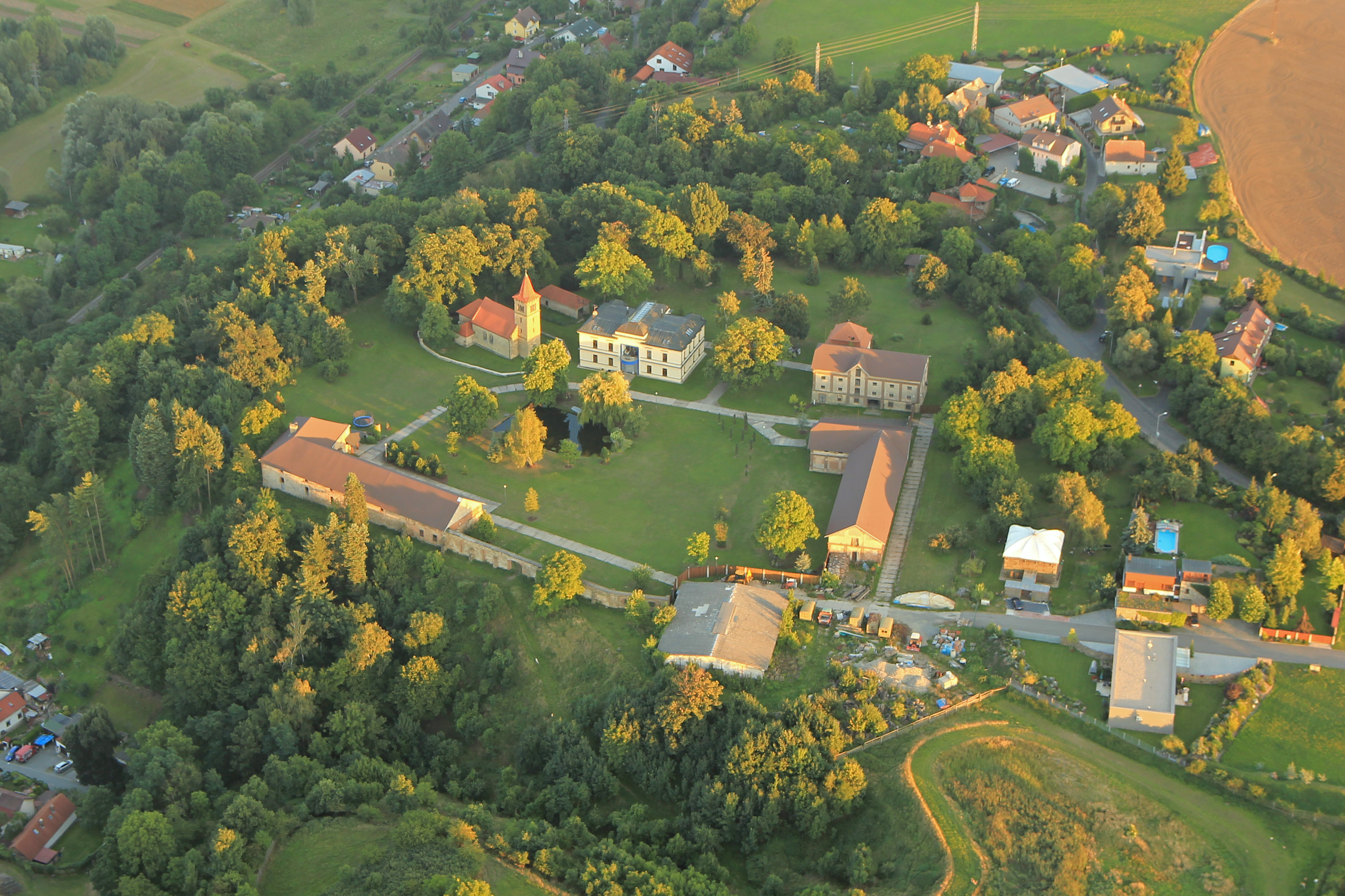 Kostel sv. Michaela, Michalovice, východní část vsi